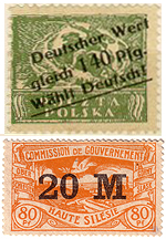 Марка прогерманской пропаганды и почтовая марка комиссии по управлению Верхней Силезией в ходе плебисцита 1921 года.